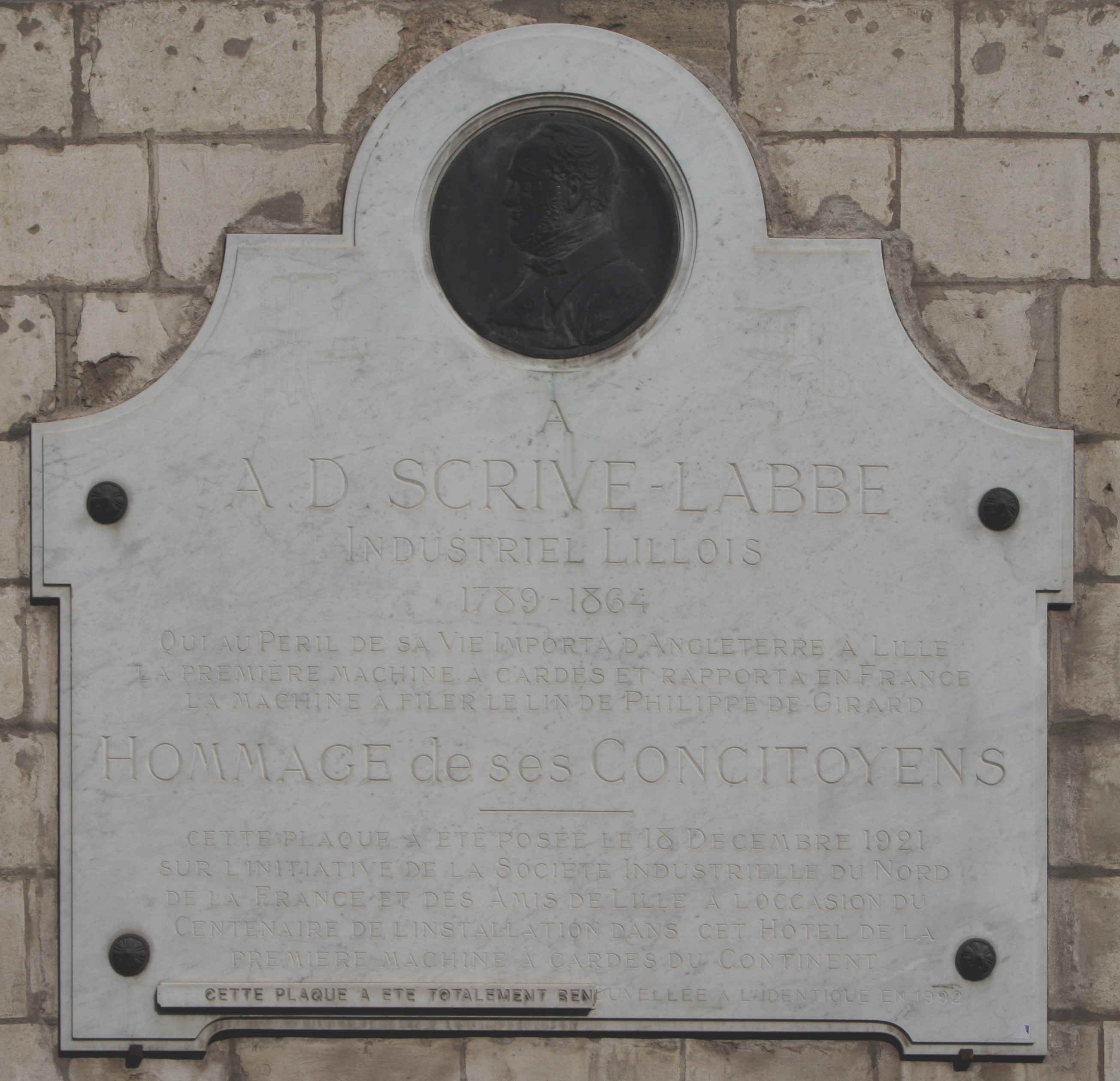 Plaque commémorative de Scrive-Labbé. Texte : A A.D. Scrive-Labbé Industriel lillois 1789-1864 Qui au péril de sa vie importa d'Angleterre à Lille La première machine à carder et rapporta en France La machine à filer le lin de Philippe de Girard Hommage de ses concitoyens Cette plaque a été posée le 18 décembre 1921 sur l'initiative de la Société Industrielle du Nord de la France et des Amis de Lille à l'occasion du centenaire de l'installation dans cet hotel de la première machine à carder du continent. Cette plaque a été totalement renouvellée à l'identique en 1992